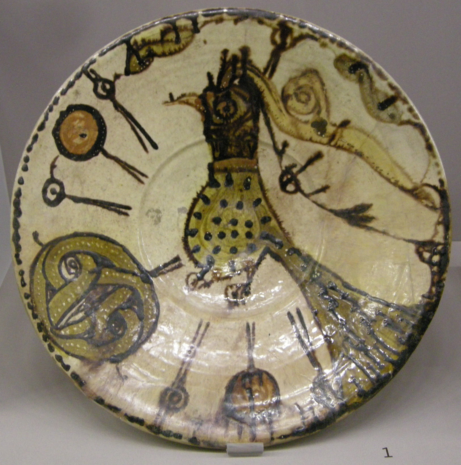 Iran, sari, coppa, x-xi sec.